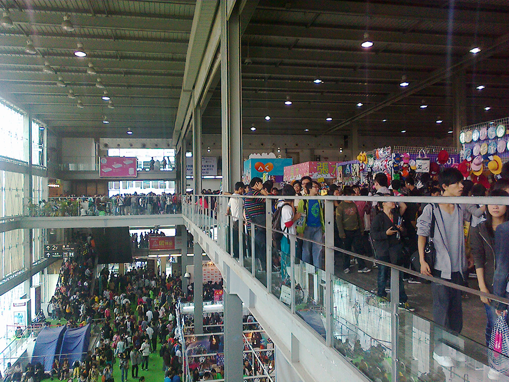 2011ACG穗港澳動漫遊戲展（10月1-5日）10月4日的場景，展場為已經拆除的廣州錦漢展覽中心。